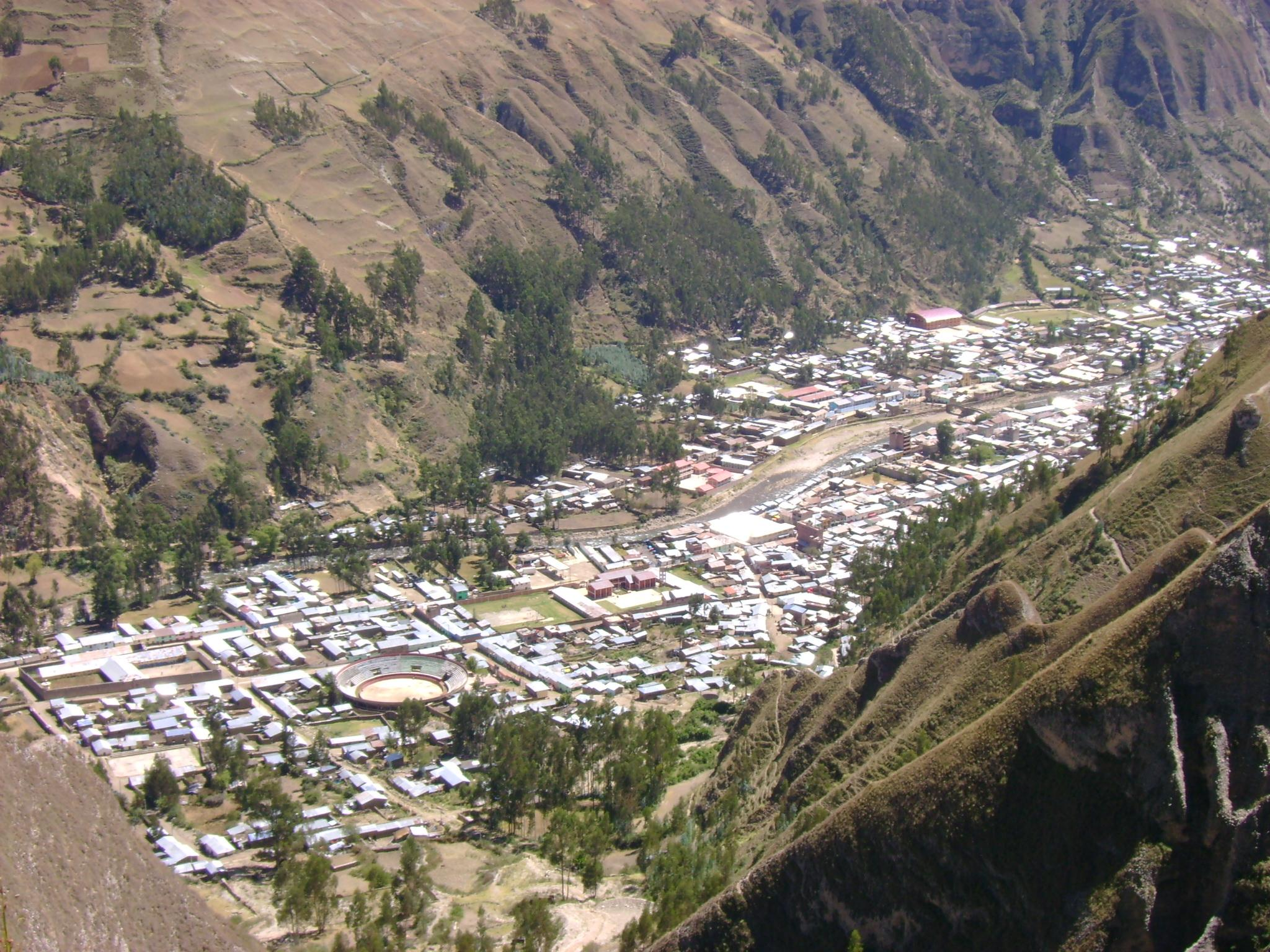 Distrito de La Union.